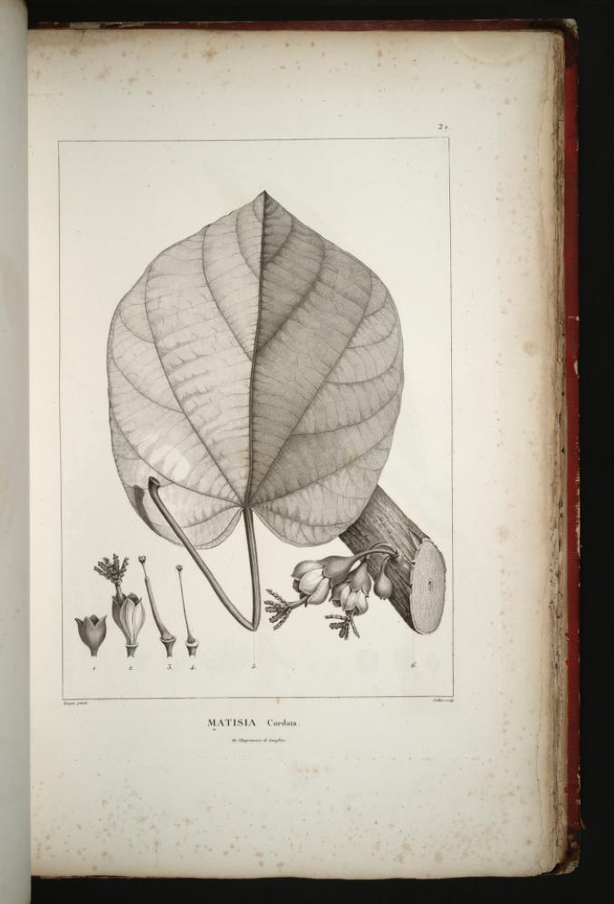 Illustration of Quararibea cordata (Orig. Matisia cordata)